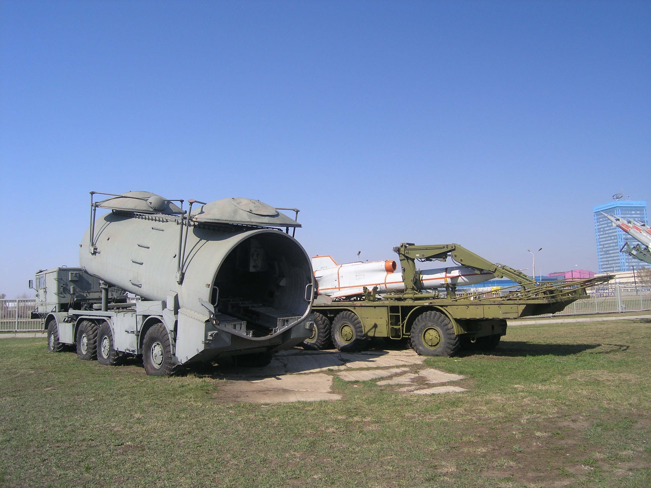 Комплекс ВР-3 с беспилотным летательным аппаратом для ведения тактической воздушной разведки. В составе комплекса: беспилотный самолёт разведчик Ту-143 "Рейс", самоходная пусковая установка СПУ-143 и транспортно-заряжающая машина ТЗМ-143 (обе на базе тягачей БАЗ-135МБ). Технический музей Тольятти